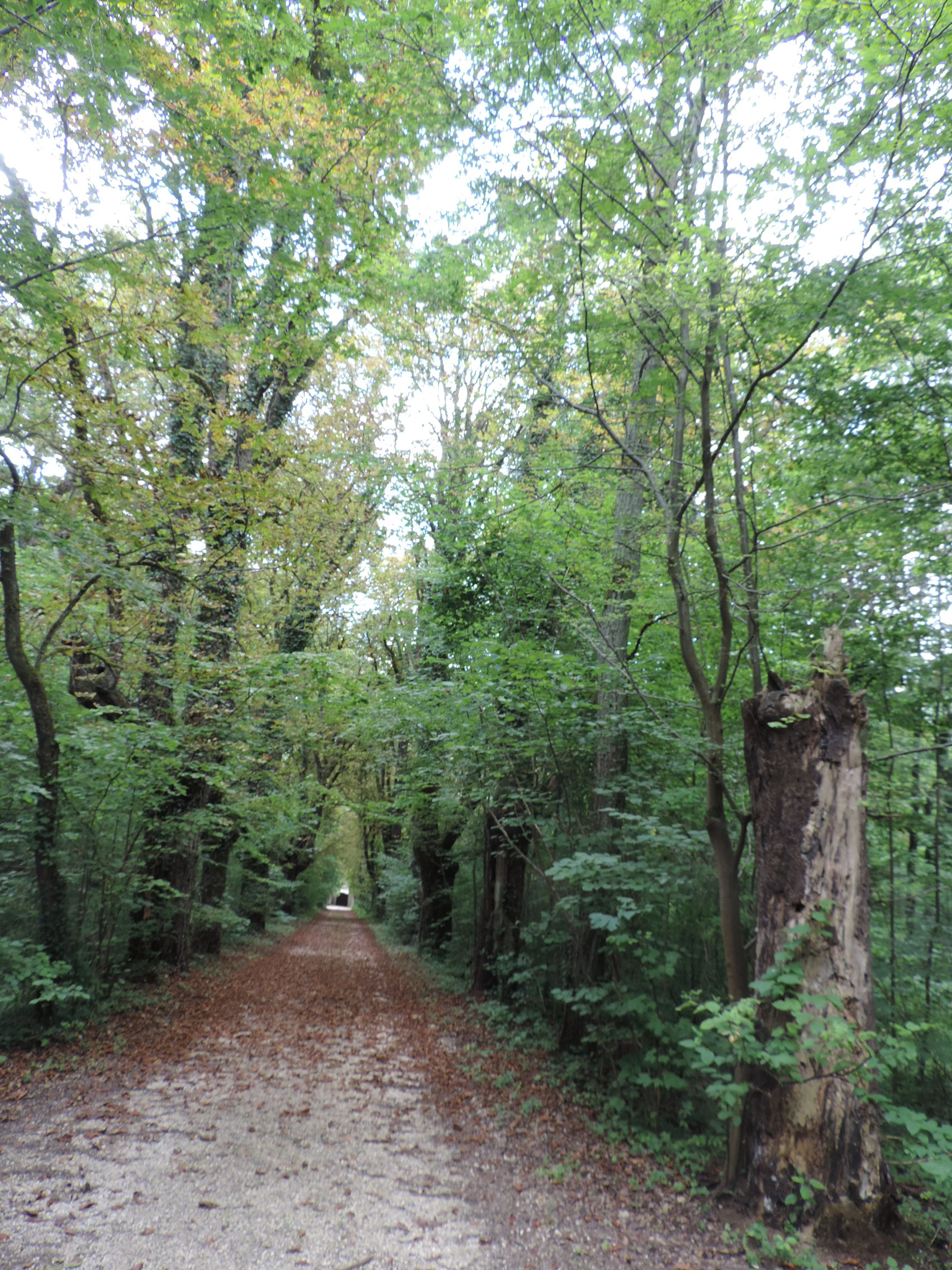 Blick in den Englischen Garten in Dischingen